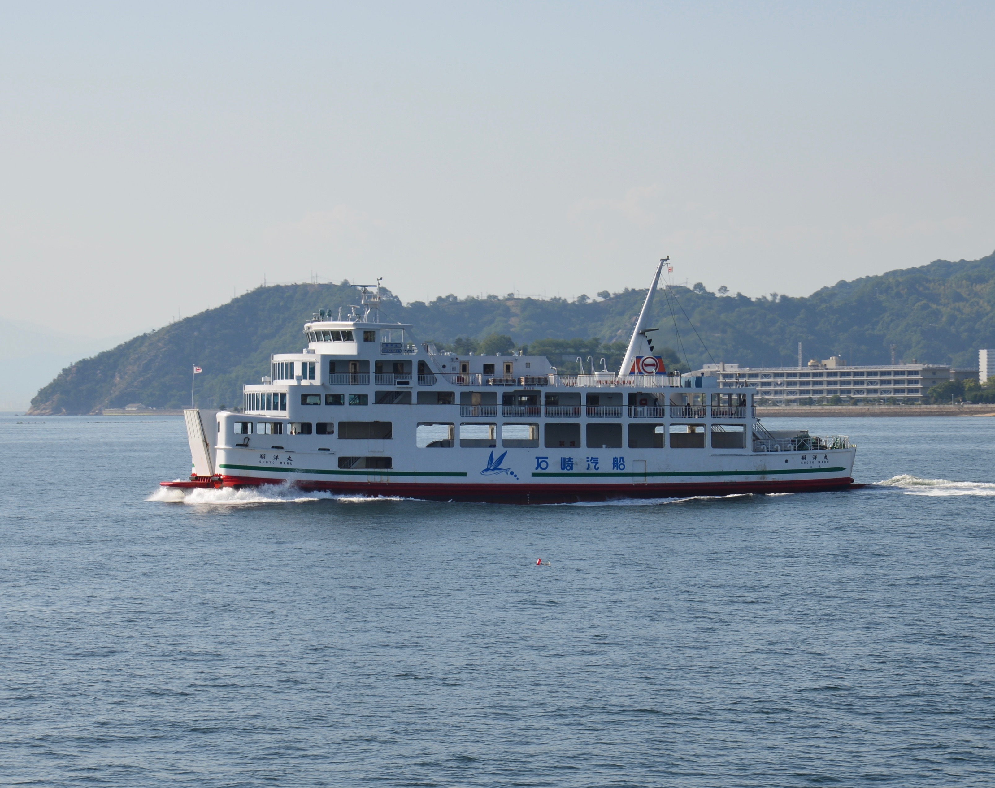 石崎汽船翔洋丸 広島県呉港にて撮影